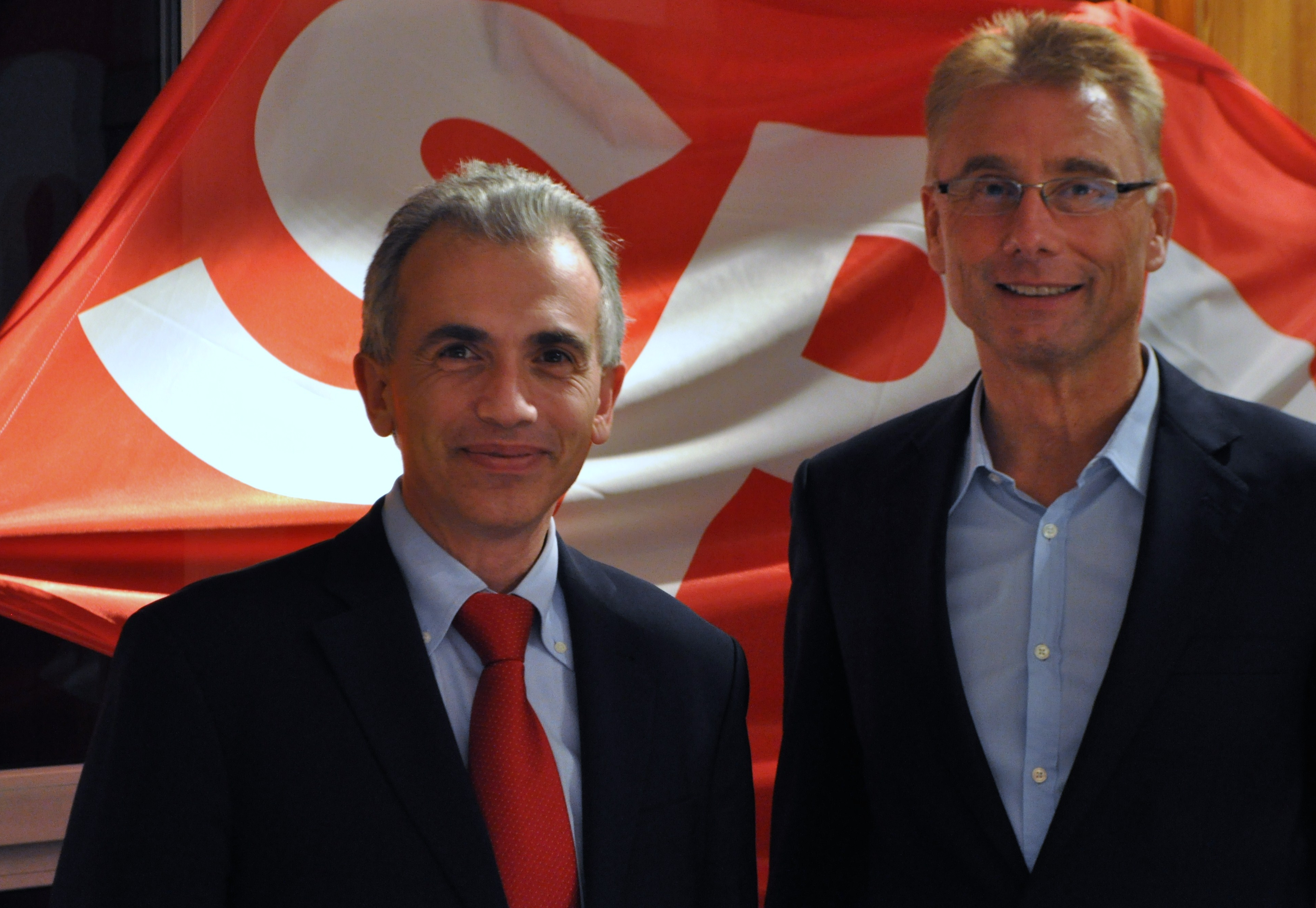 Peter Feldmann (links) , Michael Paris (rechts)